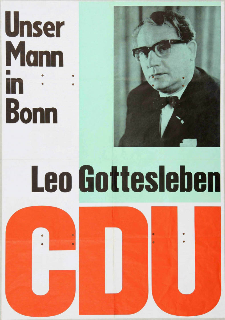 Unser Mann in Bonn Leo Gottesleben CDU Abbildung: Porträtfoto Plakatart: Kandidaten-/Personenplakat mit Porträt Auftraggeber: CDU Bonn Drucker_Druckart_Druckort: KVD Köln Objekt-Signatur: 10-001: 1380 Bestand: Plakate zu Bundestagswahlen (10-001) GliederungBestand10-18: Plakate zu Bundestagswahlen (10-001) » Die 6. Bundestagswahl am 28. September 1969 » CDU » Mit Porträtfoto Lizenz: KAS/ACDP 10-001: 1380 CC-BY-SA 3.0 DE